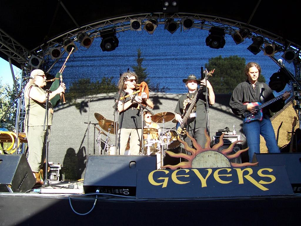 "Geyers" Historock Band beim Schäferlauf in Markgröningen 26.08.2007